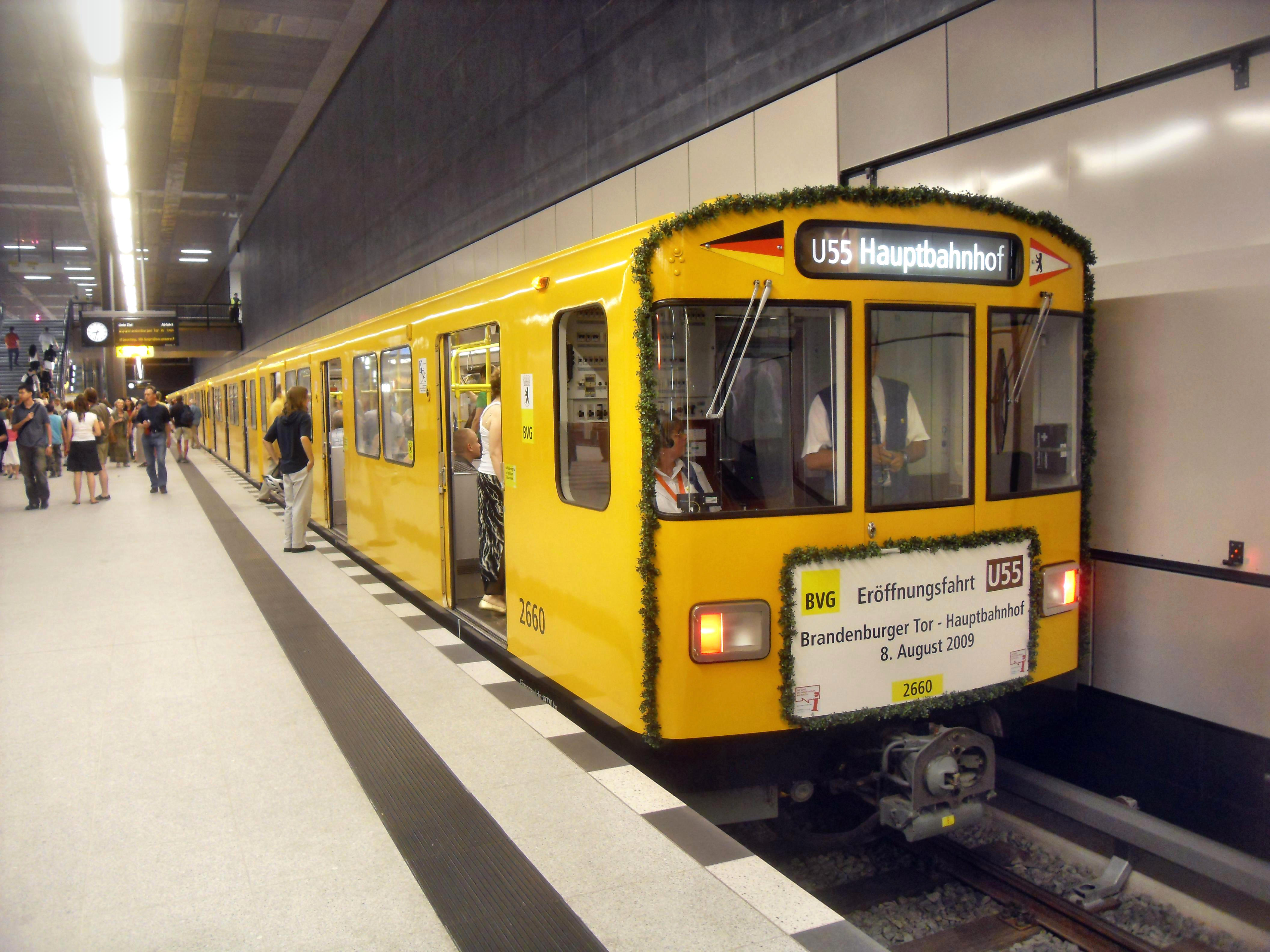 Baureihe F der Berliner U-Bahn mit Eröffnungswagen der neuen U 55